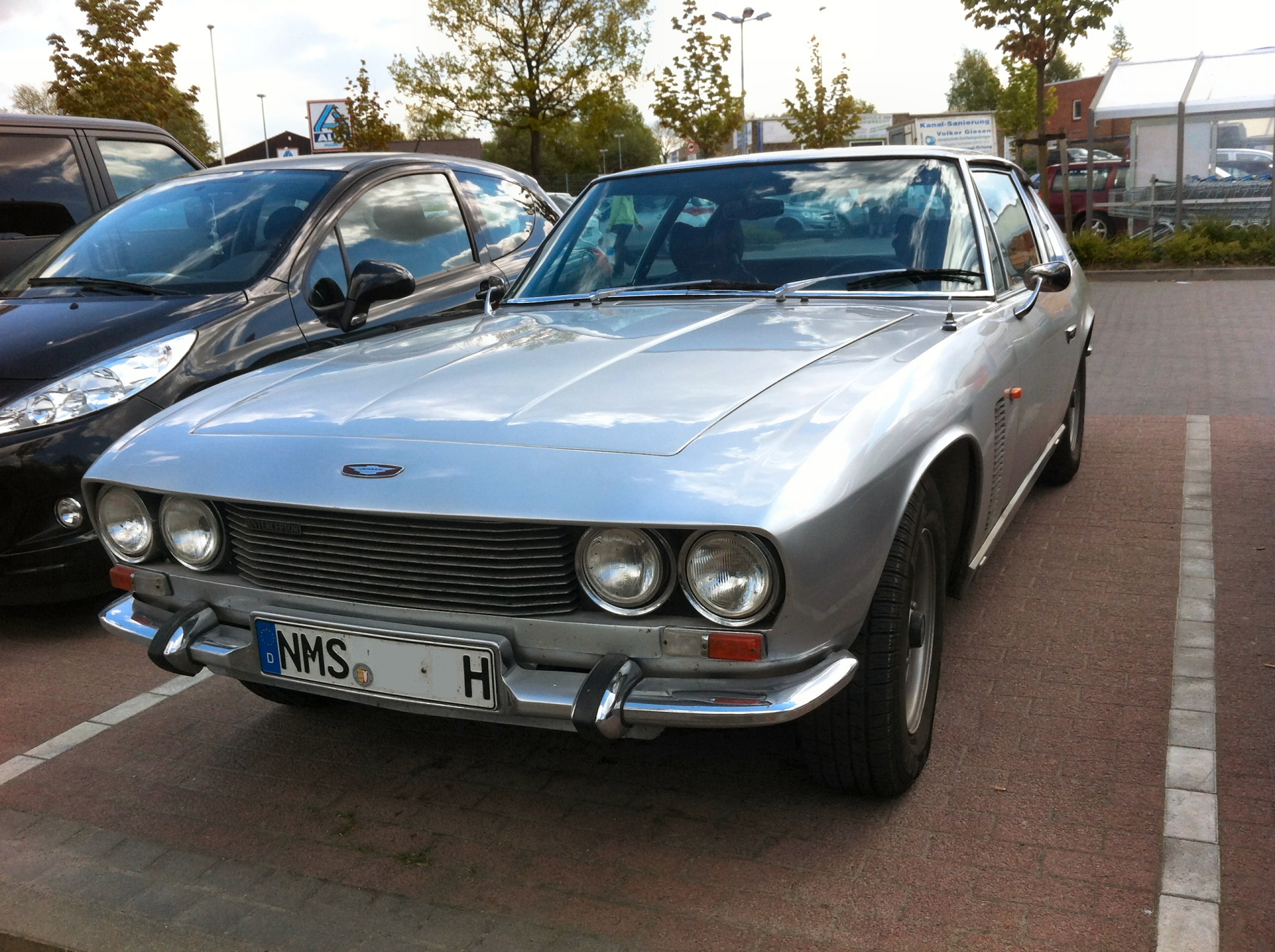 Jensen Interceptor Mk I Frontansicht